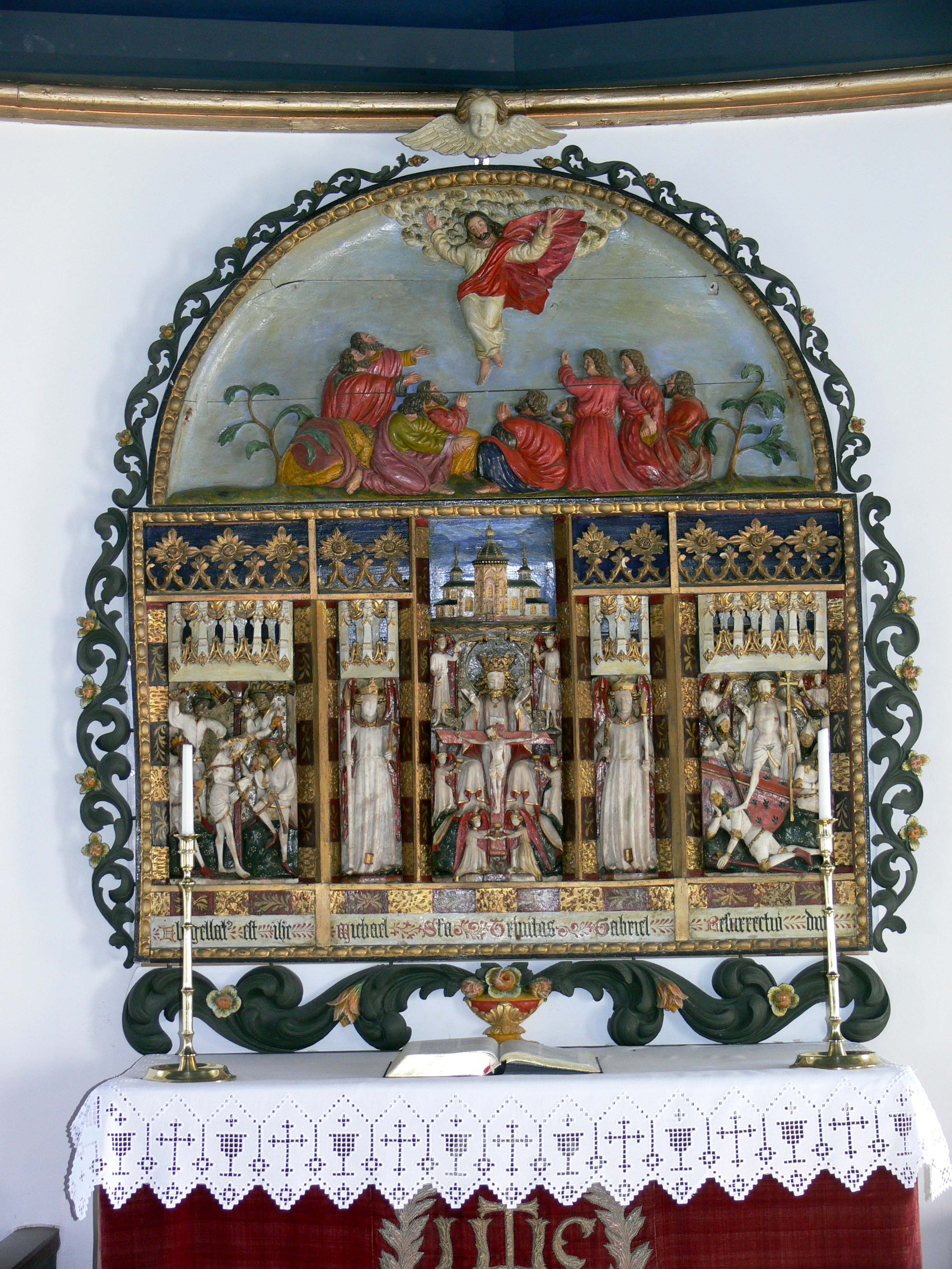 Kirche in Þingeyrar in Nordisland. Altartafel.